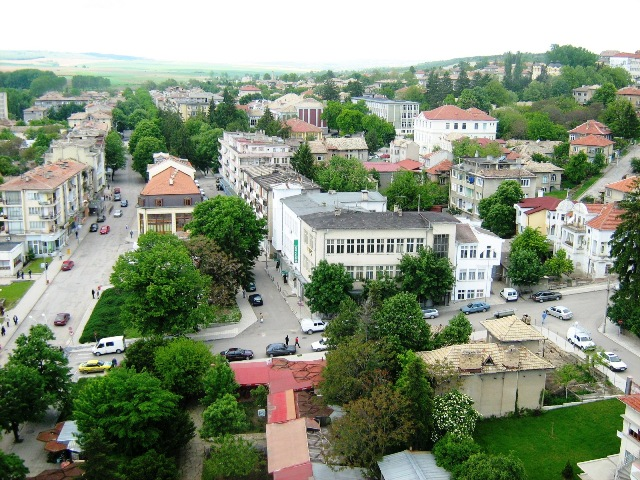 Централната част на град Попово - 12.05.2008 год. Фото: Вл. Стойков